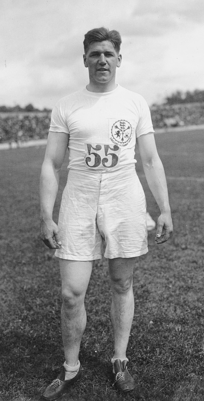 Stade Pershing : match athlétisme France-Angleterre : NOKES, gagnant du lancement de marteau : [photographie de presse] / Agence Meurisse